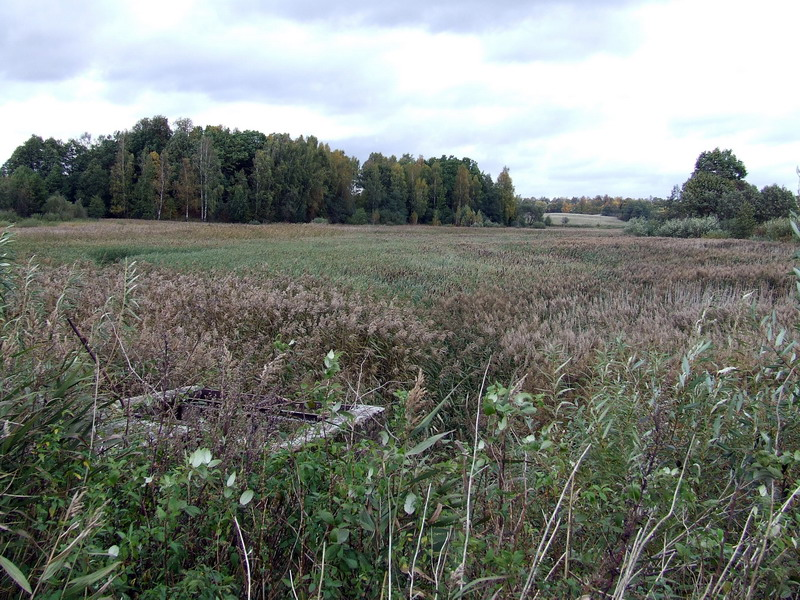 Blinstrubiškiai I pond, Raseiniai district, Lithuania.